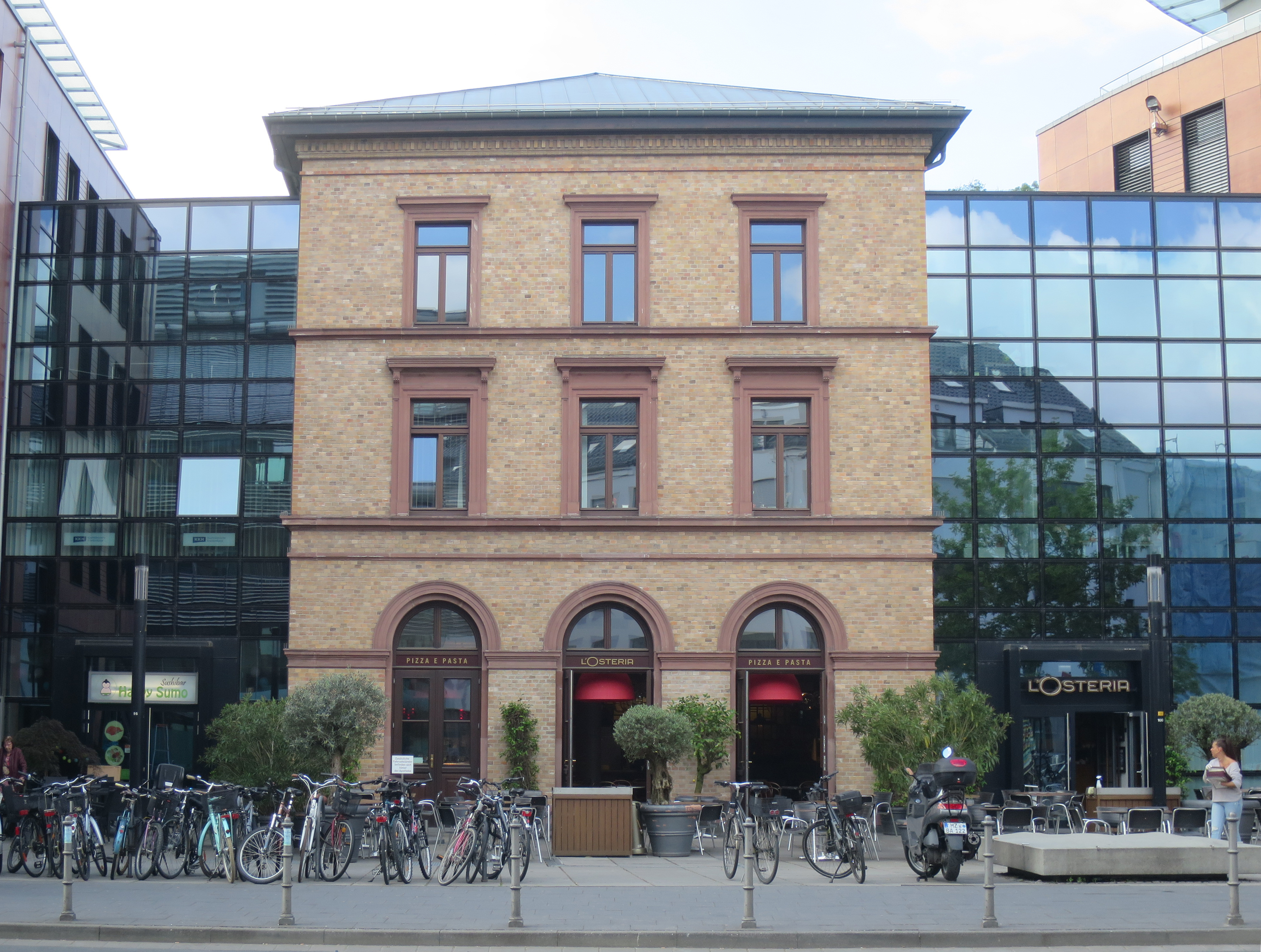 Empfangsgebäude des Bahnhofs Mainz-Römisches Theater